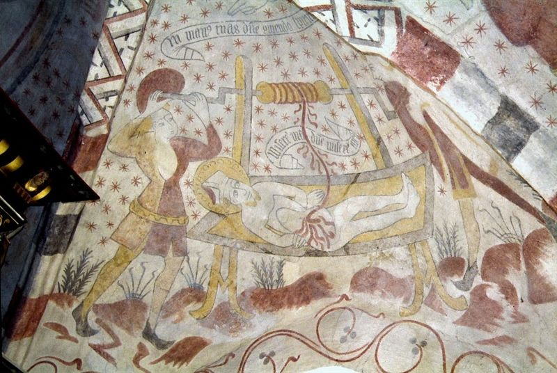 Sønder Asmindrup Kirke i Danmark. Korhvælv sydkappe, Erasmus martyrium